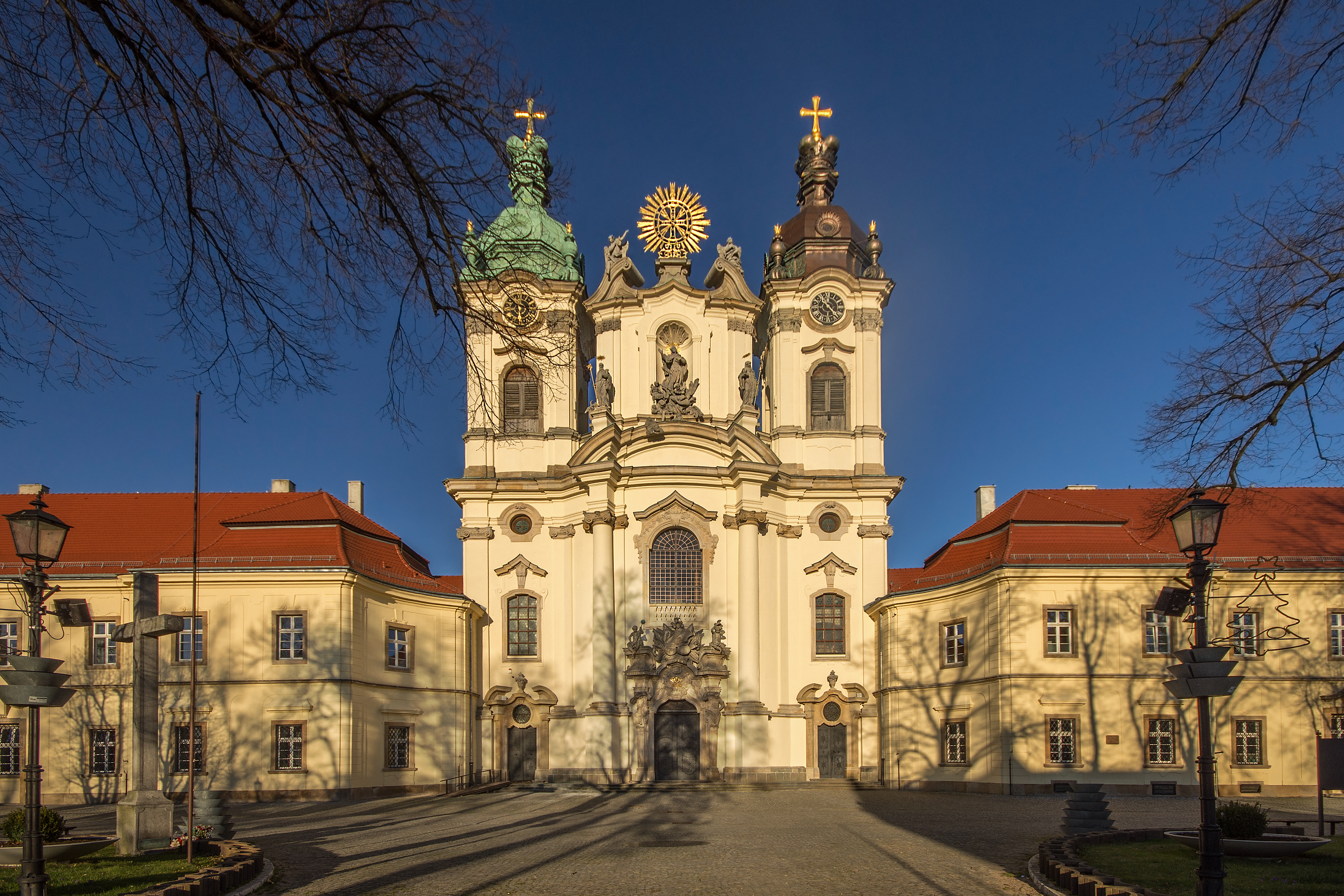 Legnickie Pole, Kościół p.w. Podwyższenia Krzyża Św. i Św. Jadwigi|kościół, ob. par. p.w. św. Jadwigi, 1727-1733